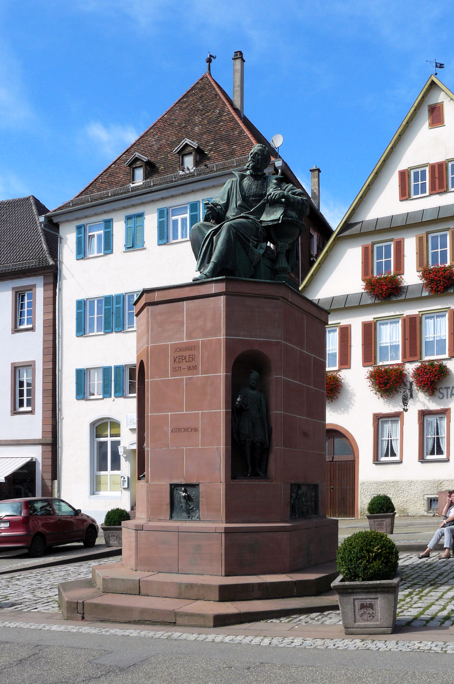 Keplerdenkmal in Weil der Stadt